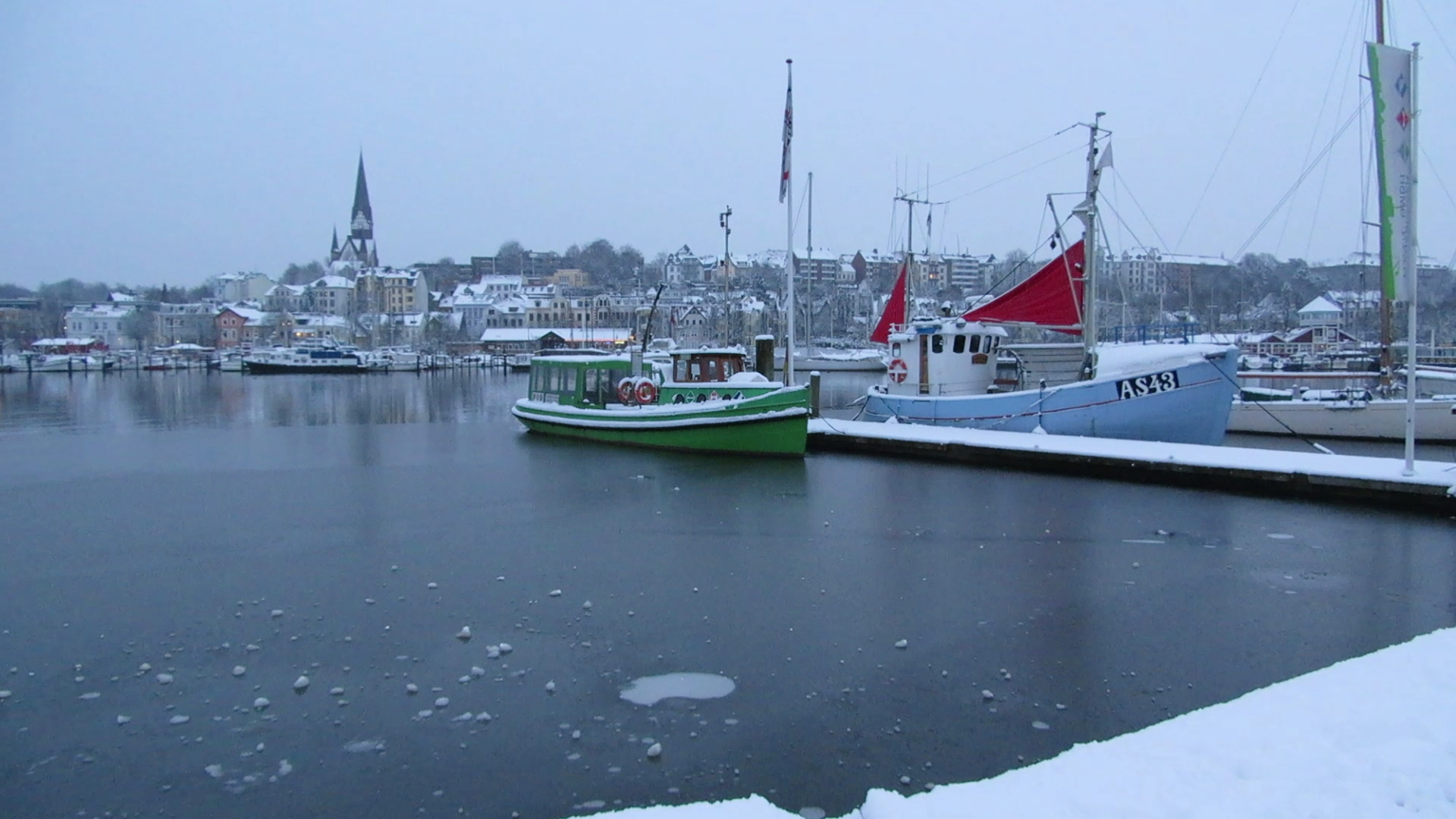 Schleppbarkasse Solitüde (Flensburg 2013), Bild 00